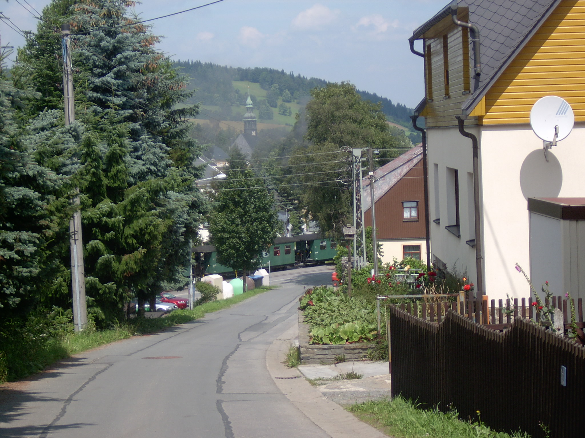 Česky: Okraj obce Neudorf 300 m před nádražím, ulice od pyramidy (pomníku) Kretscham-Rothensehma